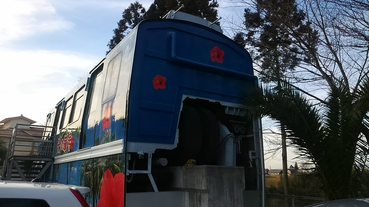 モノレールのゴムタイヤ